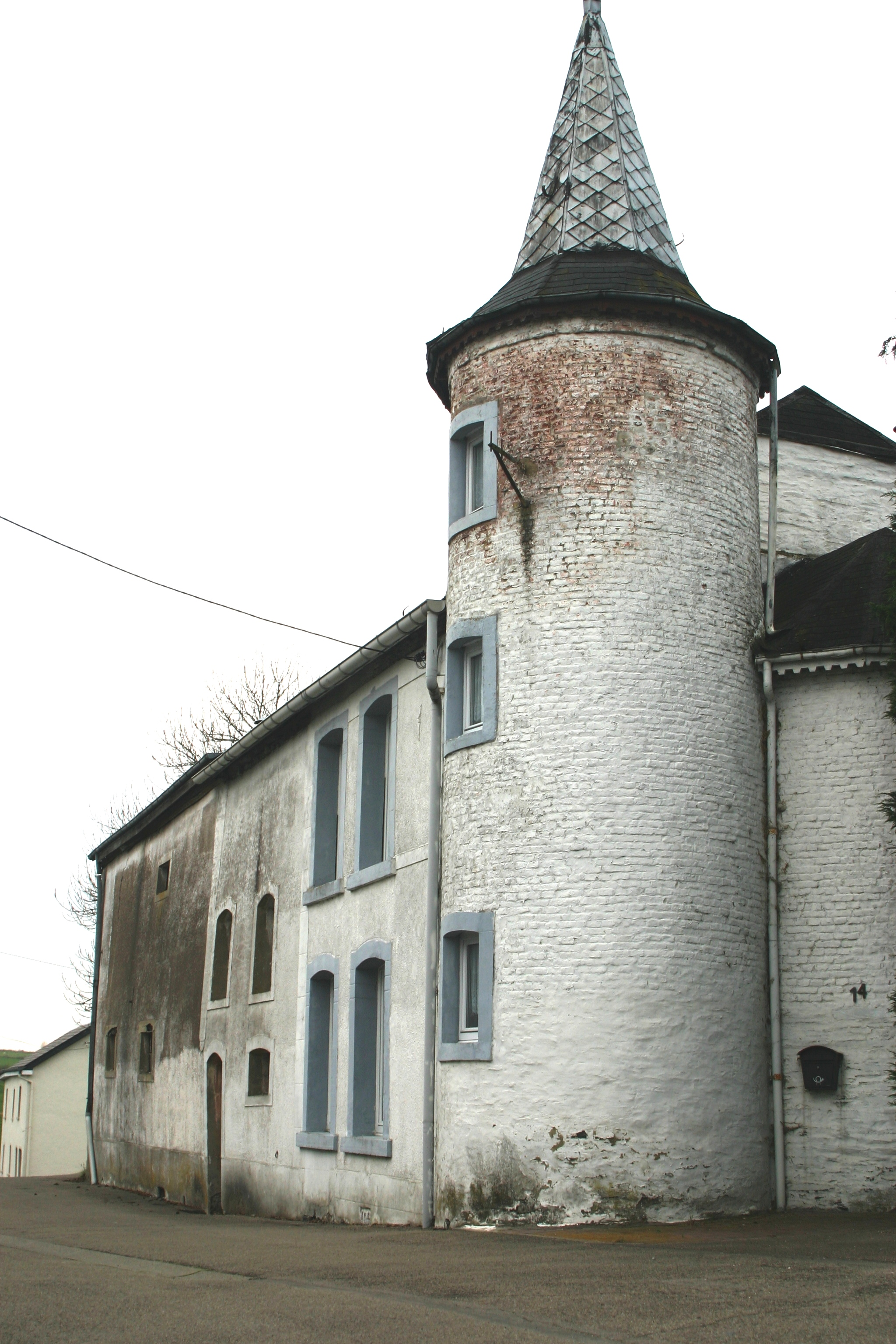 Alt Haus zu Assenois. Assenois + Assenois